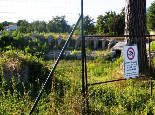 I resti dell'anfiteatro di Telesia (provincia di Benevento).